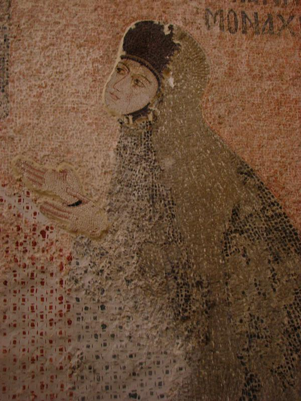 Kariye Muzesi